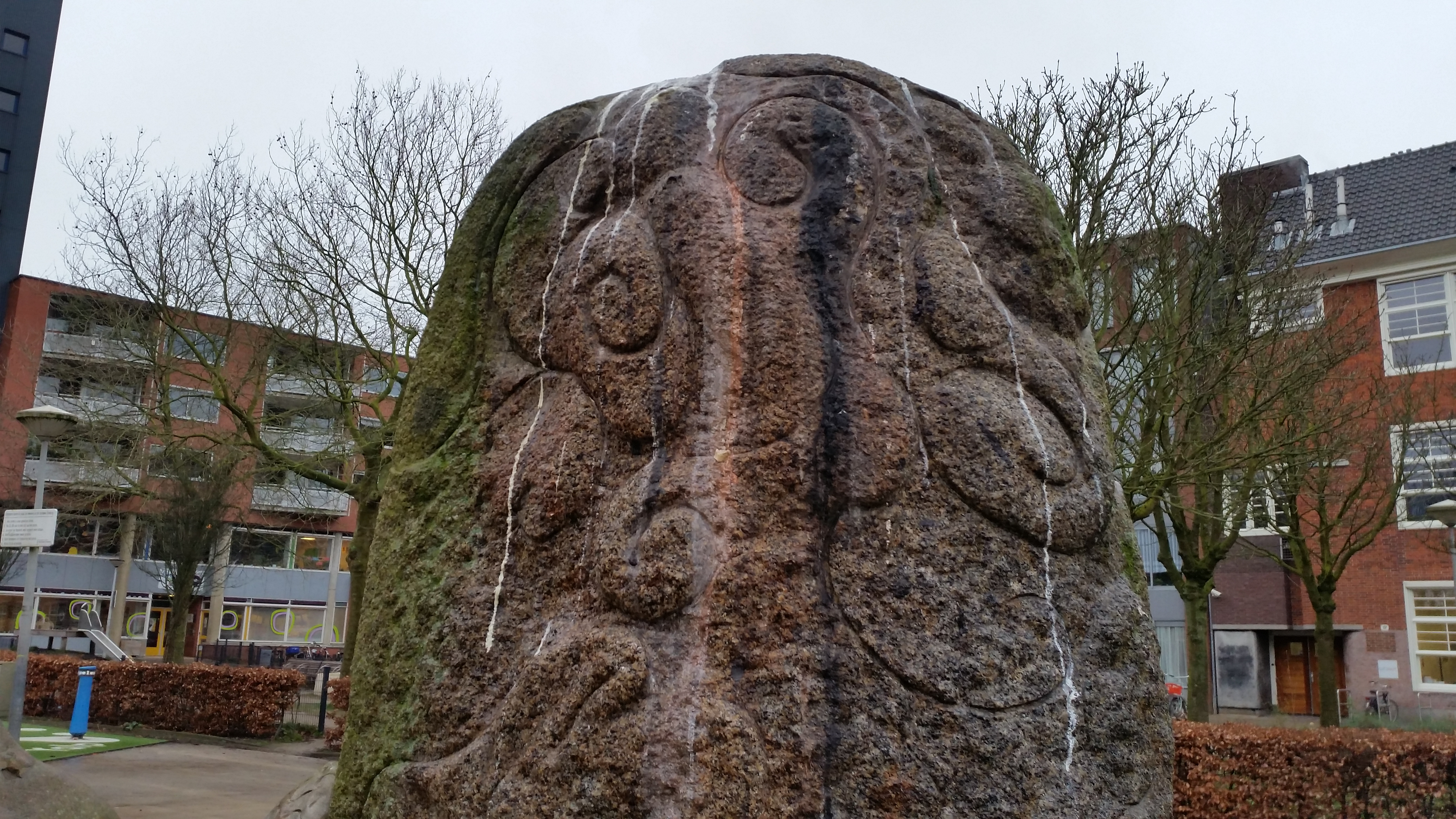 Sporen volgen het Javaplantsoen van Wim Tap in januari 2020 op het Javaplantsoen, Amsterdam-Oost